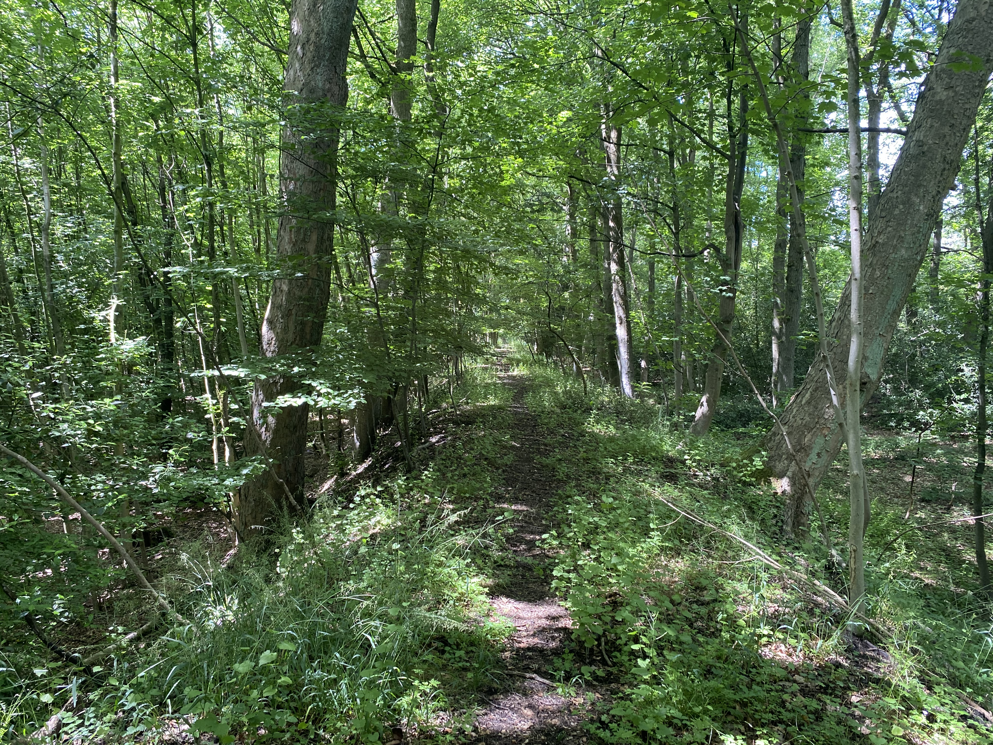 Reste der Kohlenbahn im Wald Am Stork